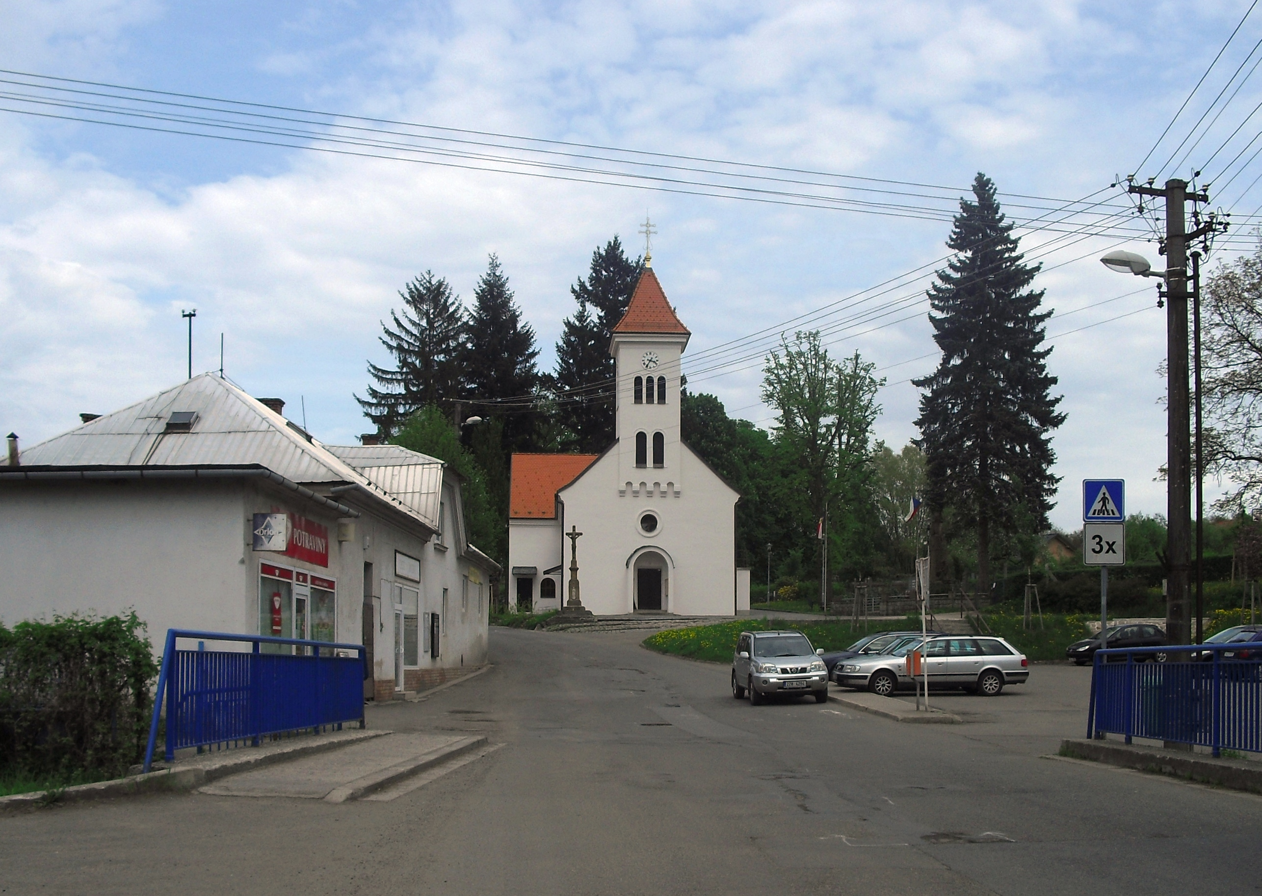 Kostel sv. Bartoloměje (Březnice), Březnice